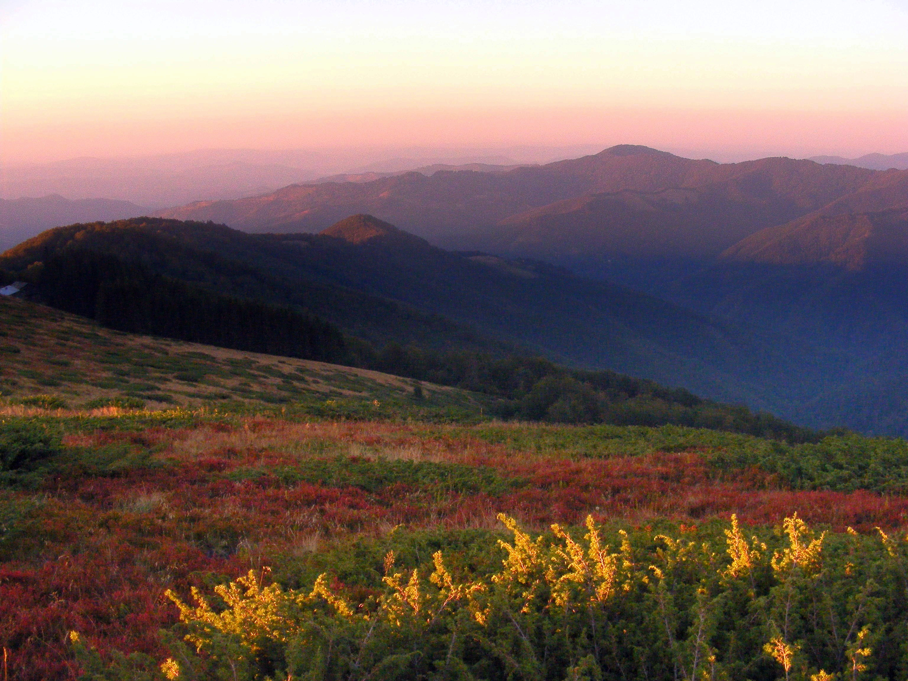 Каменщица